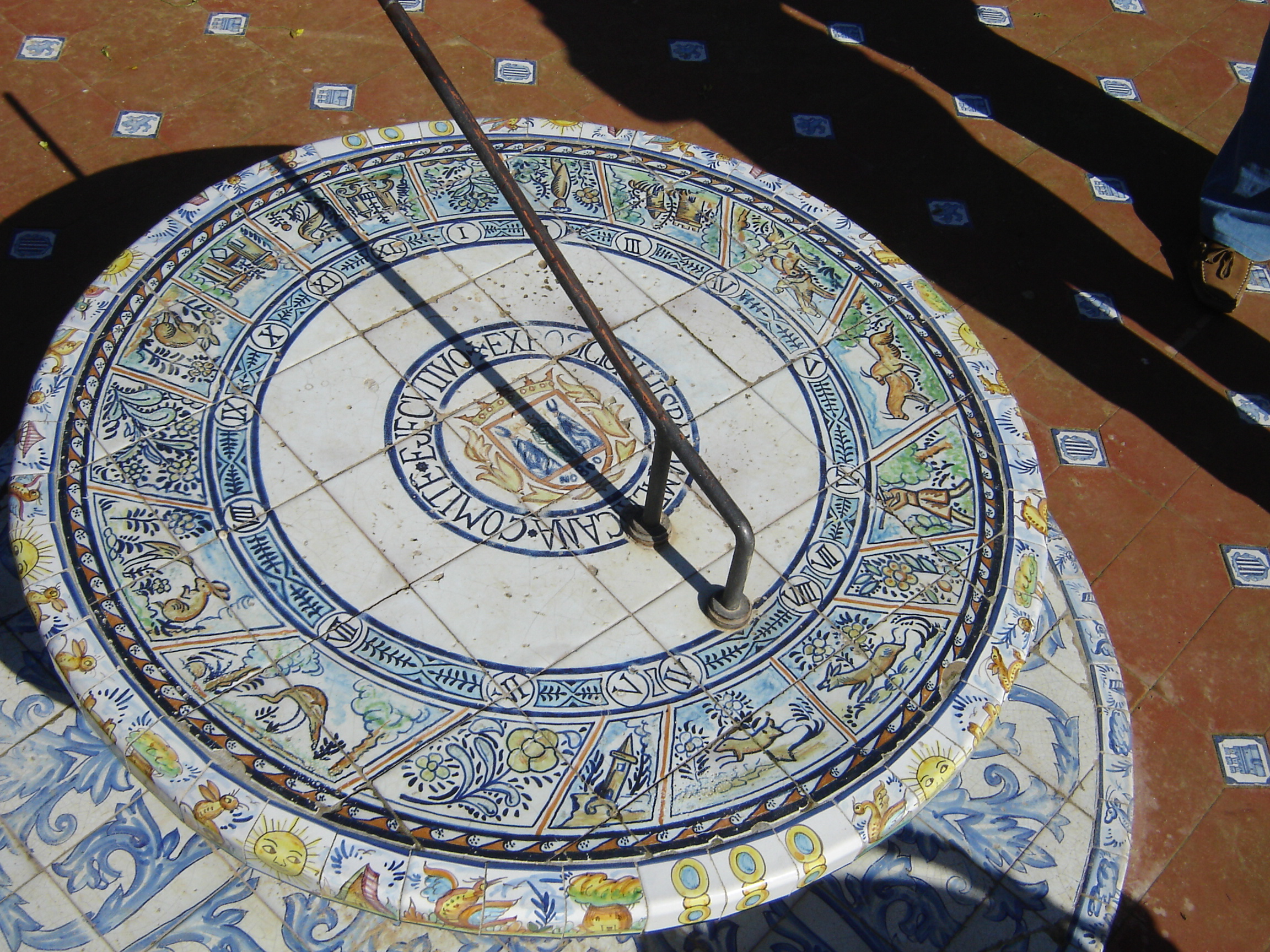 Glorieta del Reloj. Plaza de América, Parque de María Luisa (Sevilla). "EXPOSICION*HISPANOAMERICANA*COMITE*EJECVTIVO*" Realización propia.